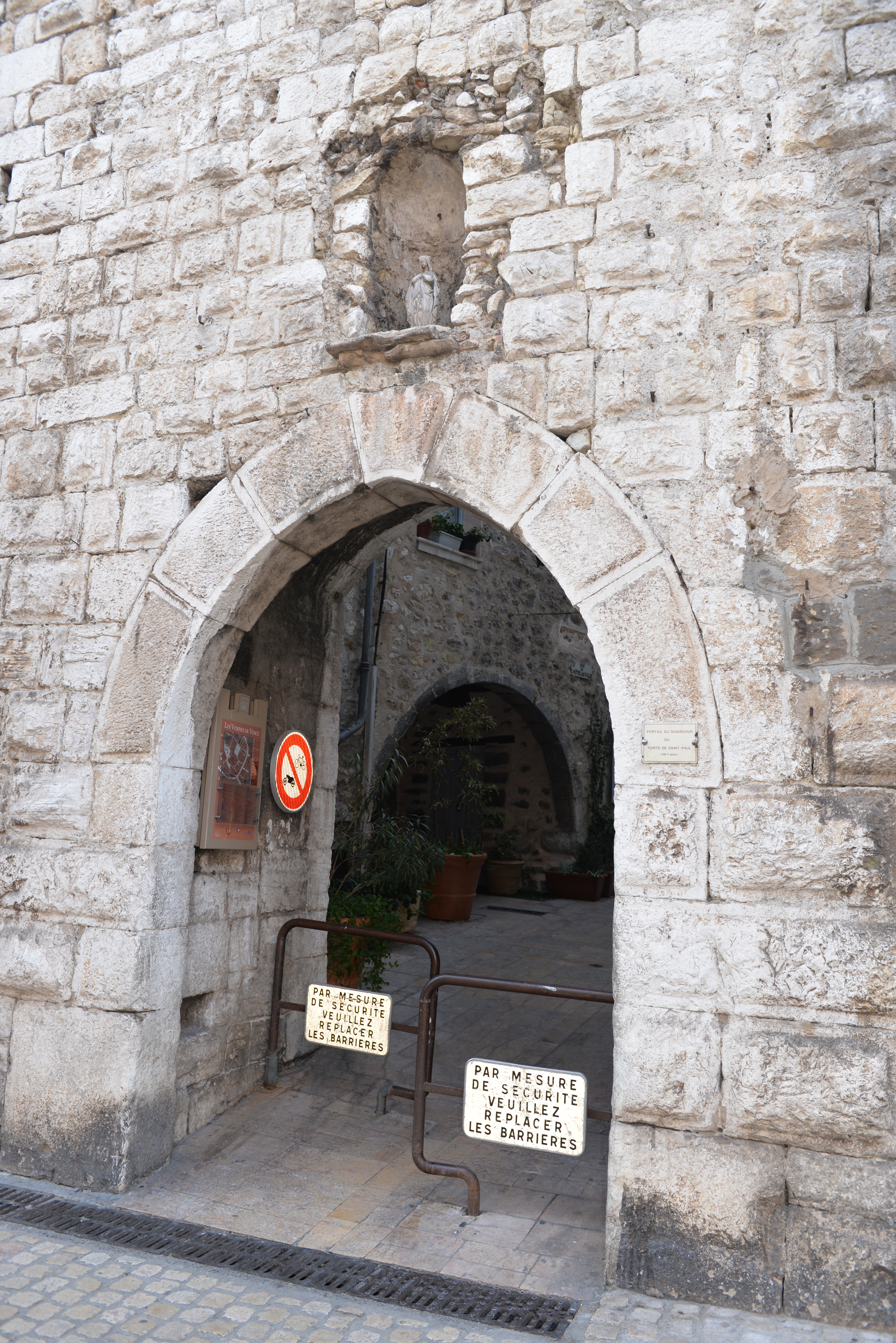 Remparts de Vence (Alpes-Maritimes) - Porte du Signadour